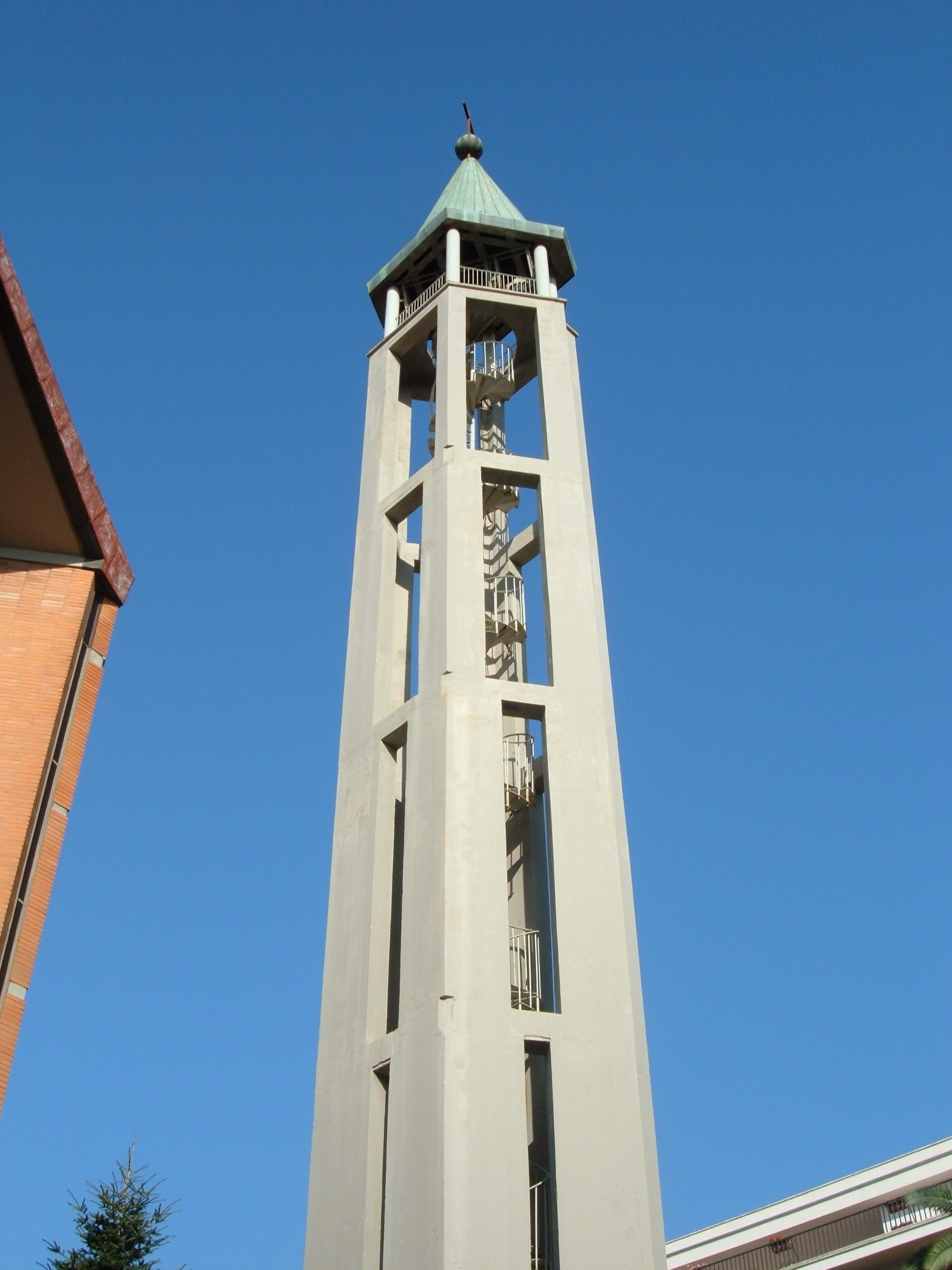 Chiesa parrocchiale di Santa Marcella, a Roma, nel quartiere Ostiense, in piazza Nicoloso da Recco.